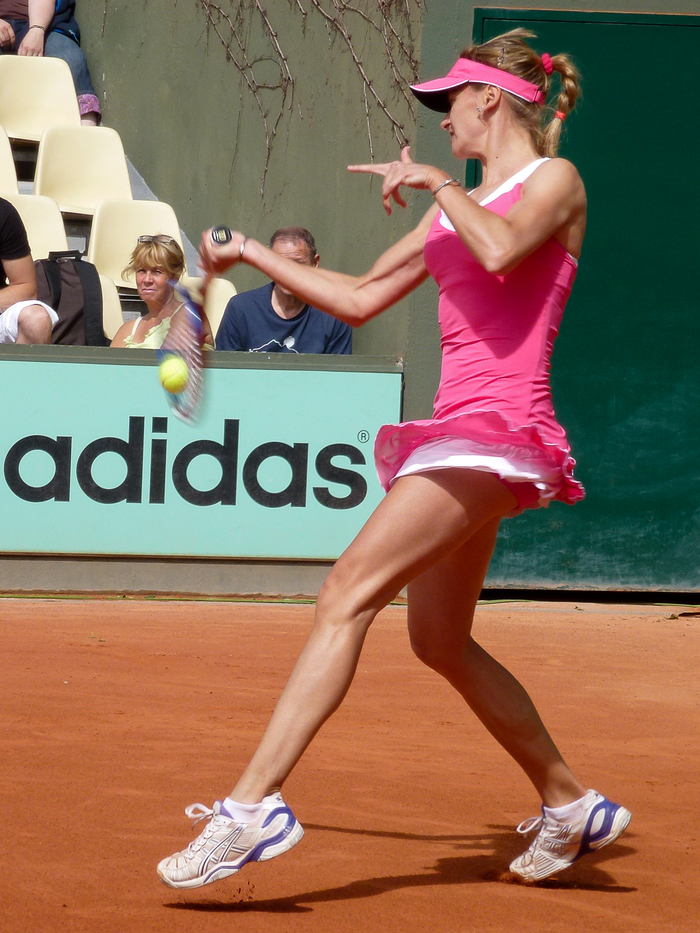 Caroline Garcia (FRA) def. Zuzana Ondraskova (CZE) Roland Garros 2011 - mardi 24 mai - 1er tour